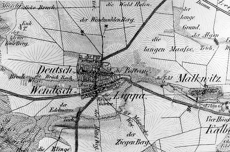 Original image description from the Deutsche Fotothek Wermsdorf-Luppa. Oberreit, Sect. Oschatz, 1839/40